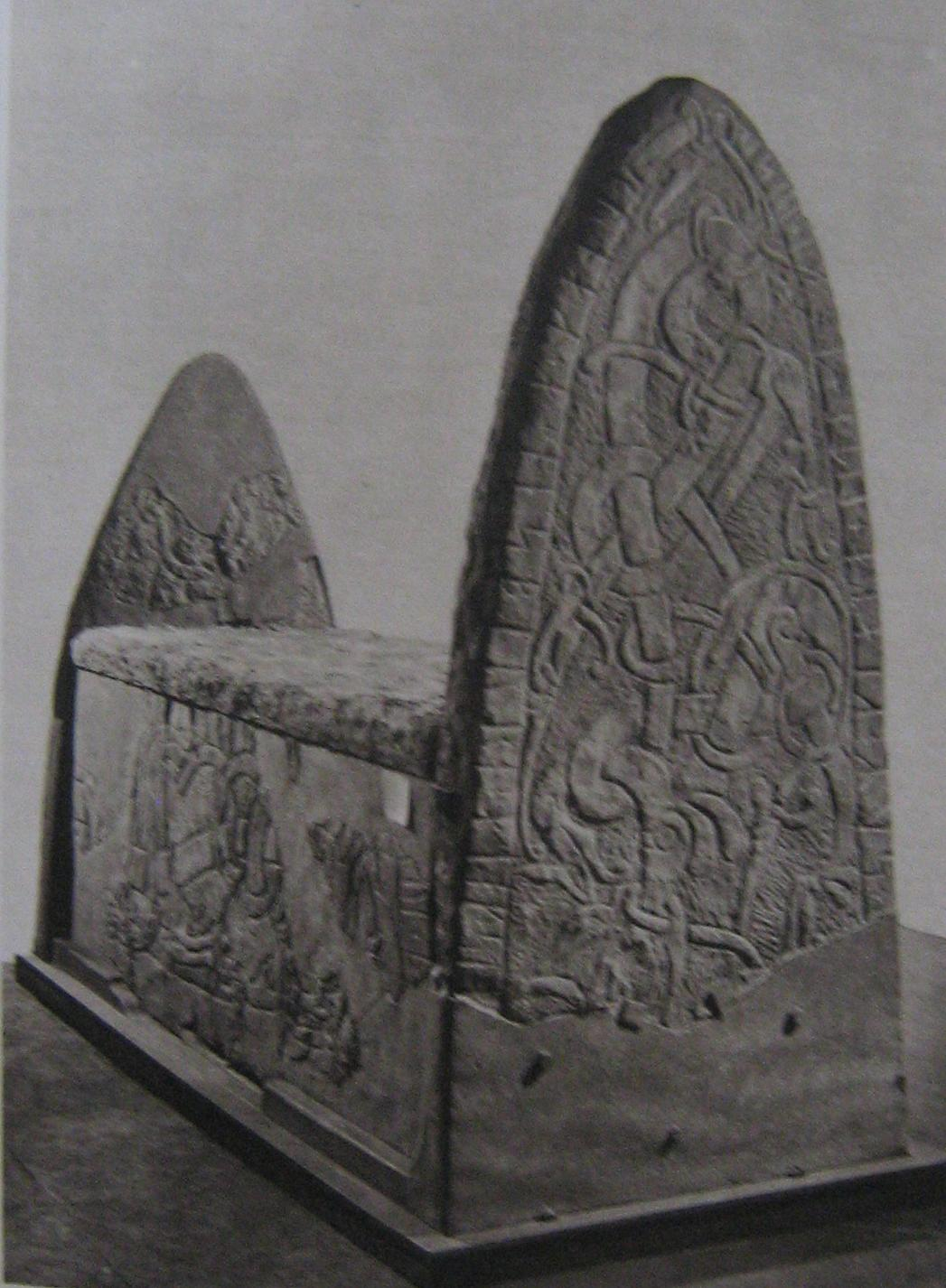 Runristad Eskilstunakista (Sö 356), påträffad vid arkeologiska undersökningar i Eskilstuna 1912. Gravkistan, som dateras till 1000-talets andra hält är utförd av stenhuggaren Näsbjörn och runristaren Tove.